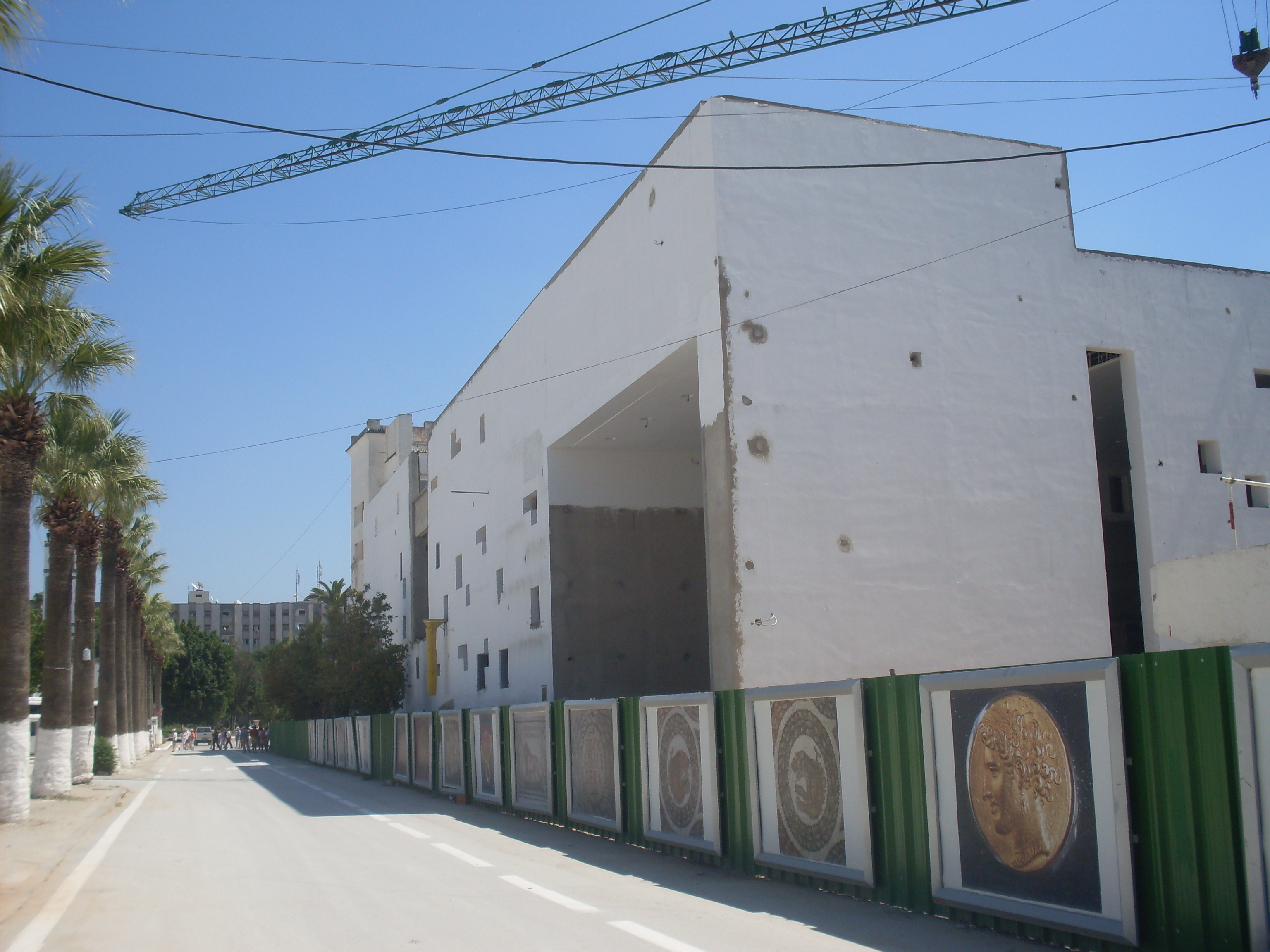 Tunis, Travaux d'extension du musée national de Bardo